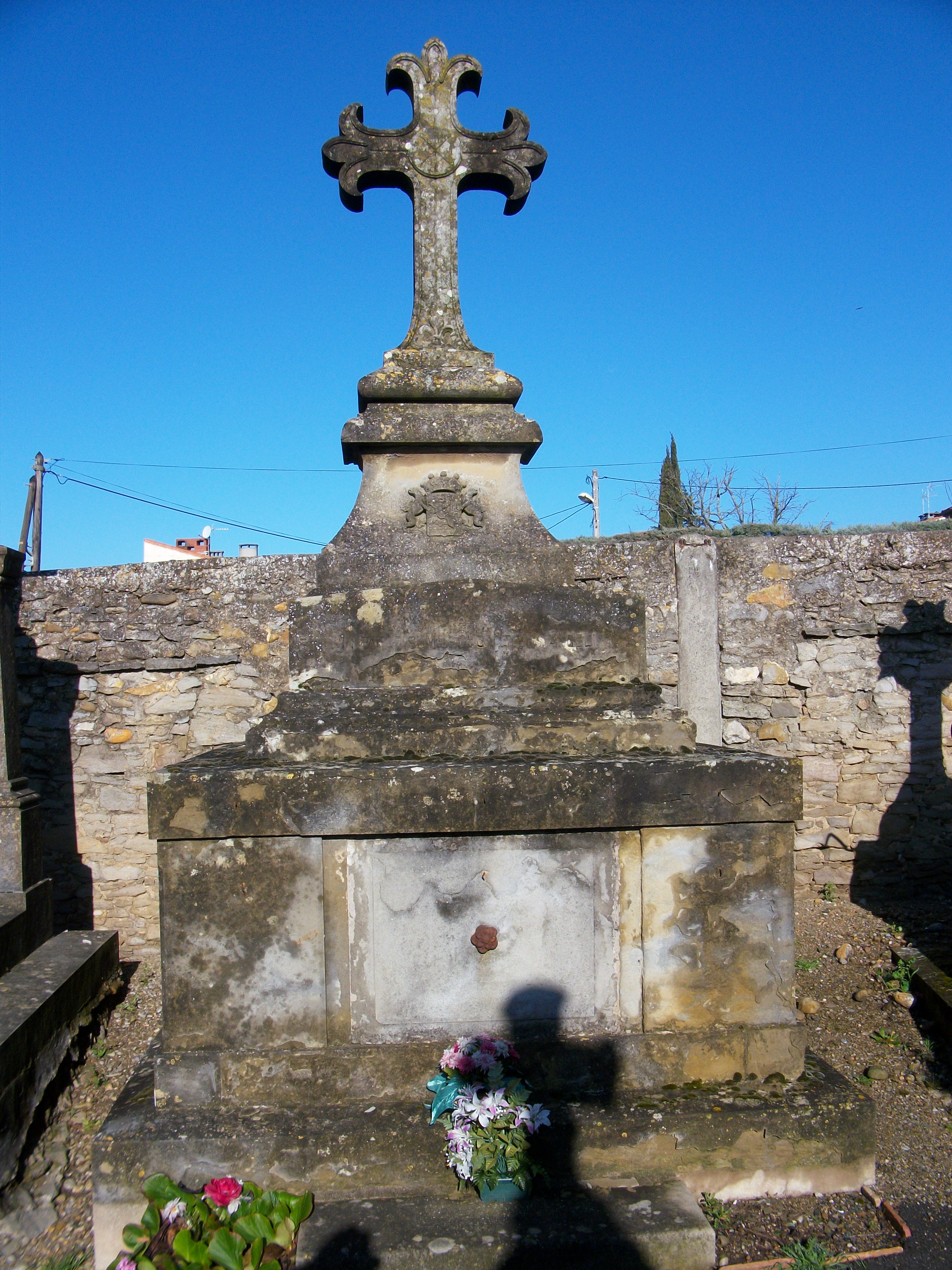 La tombe du baron, député et maire de Carcassonne, Charles Fournas de la Brosse de Moussoulens au cimetière Saint-Vincent à Carcassonne.